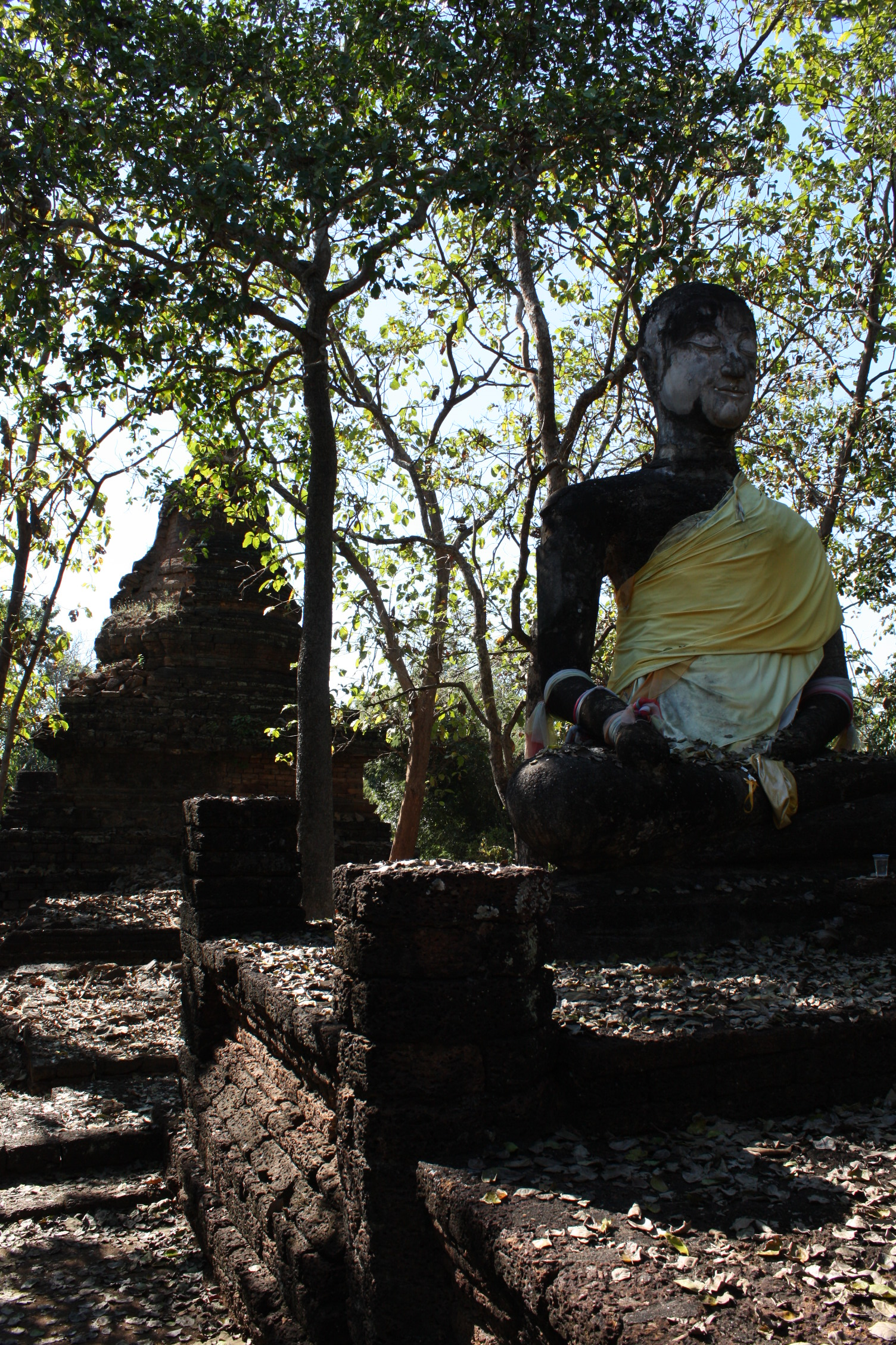 วัดเขาพนมเพลิง